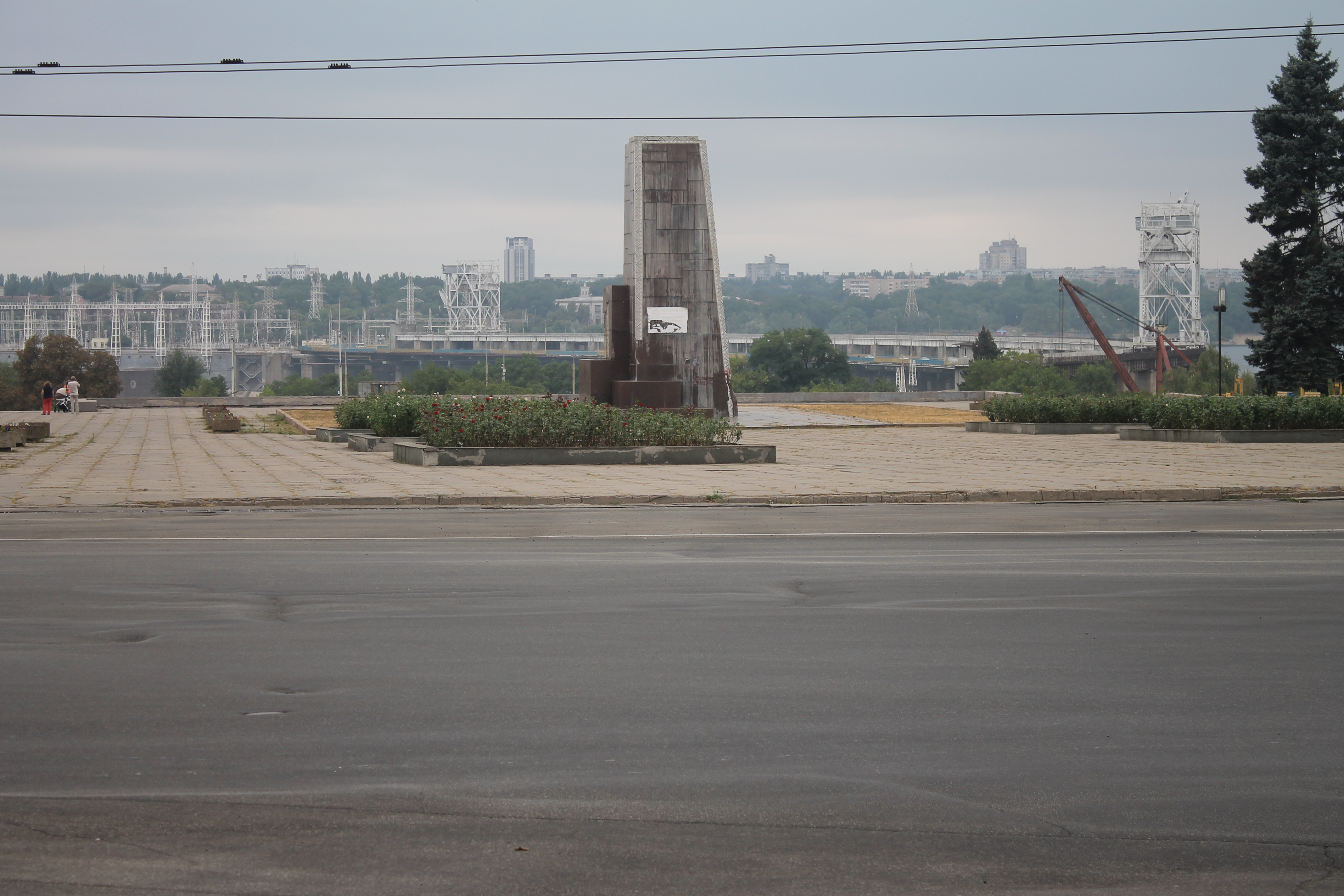 Рештки пам'ятника Леніну в Запопріжжі (серпень 2016)